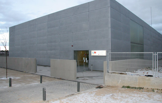 El Centro de Salud La Rivota fué inaugurado en 2007